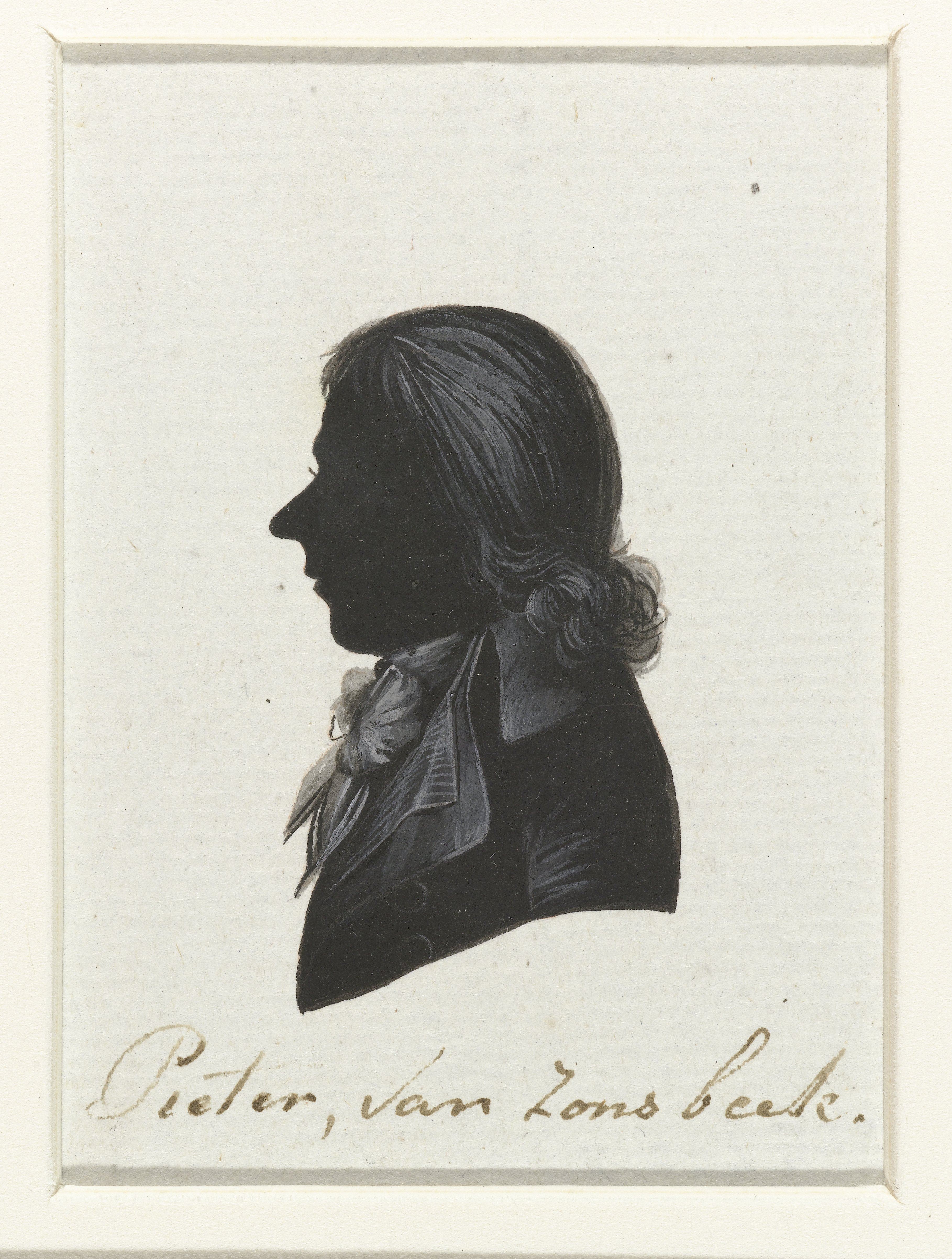 P. van Zonsbeek. Tekening in Oost-Indische inkt, waarschijnlijk gemaakt door Hausdorff. De tekening behoort tot een serie van portretten van afgevaardigden naar de Eerste Nationale Vergadering in 1796-1797. Van de serie werden gravures gemaakt die zijn afgedrukt in "Geschiedenis der staatsregeling, voor het Bataafsche volk", een boek van Cornelius Rogge (1799).